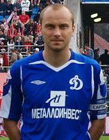 Dmitri Khokhlov, Russian footballer